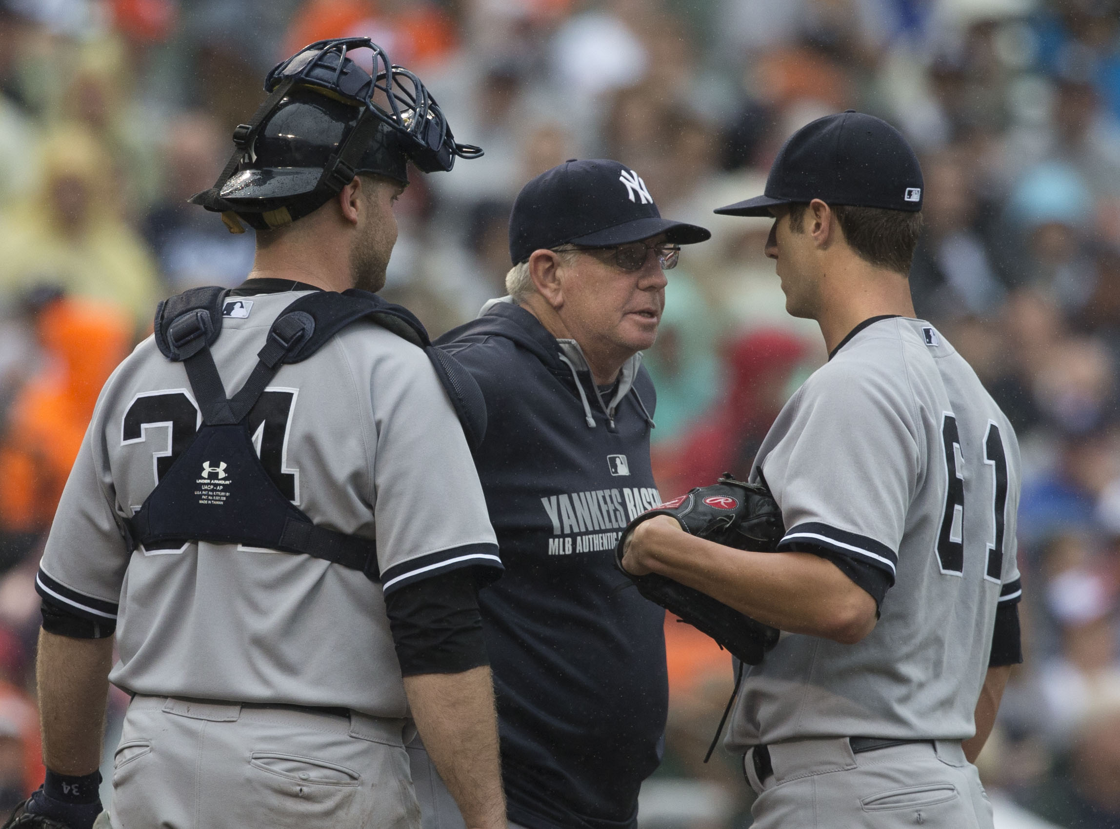 Yankees at Orioles 9/13/14